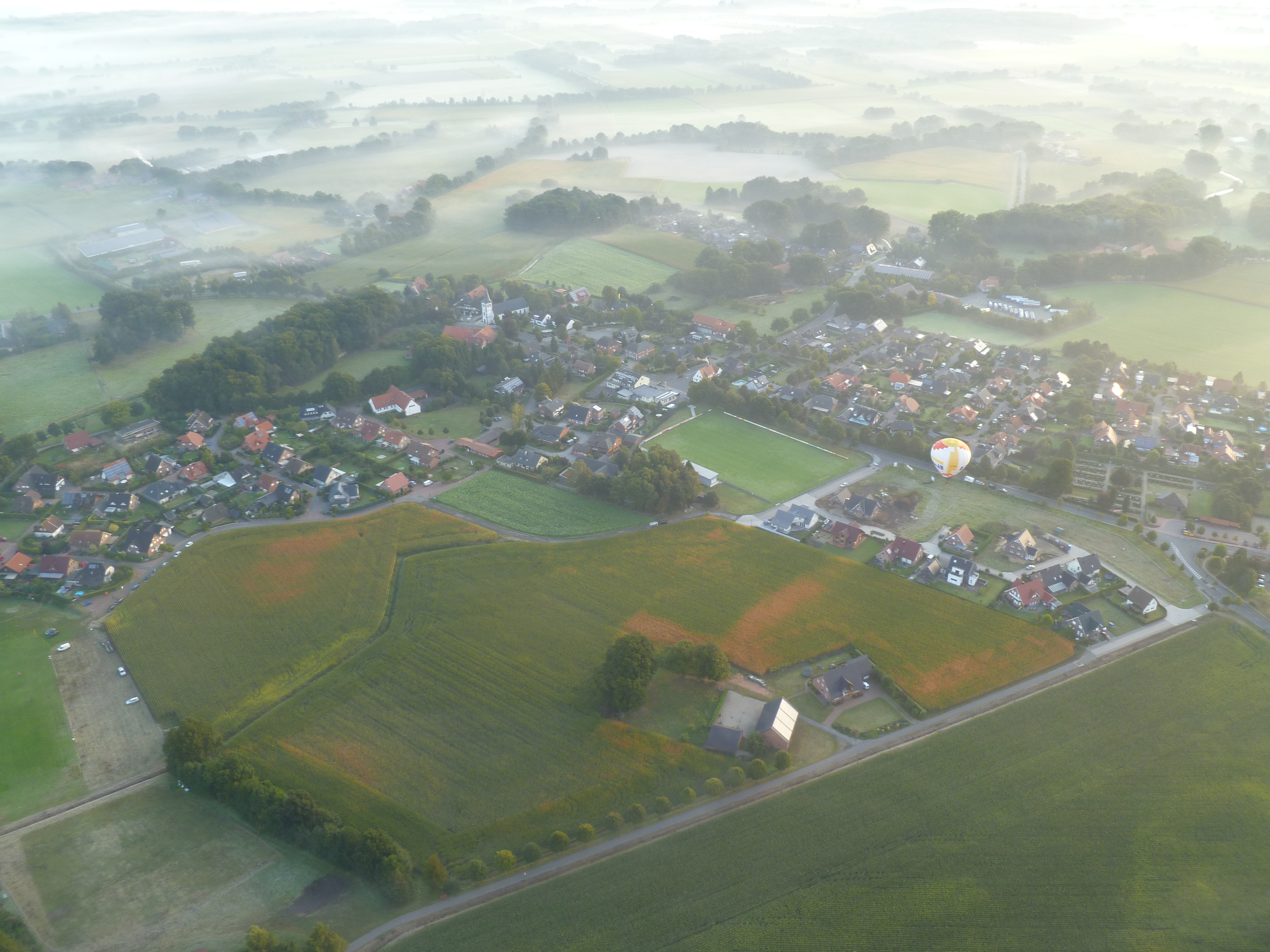 Halverde vom Ballon aus